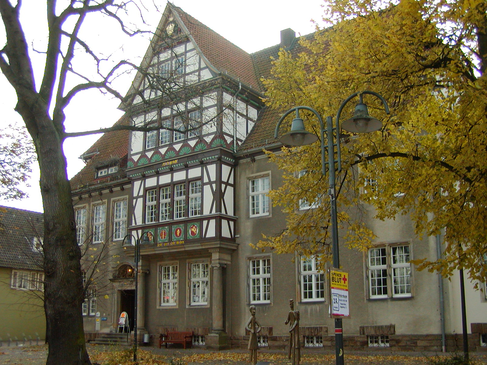 Altes Amtsgericht Sonstiges: .